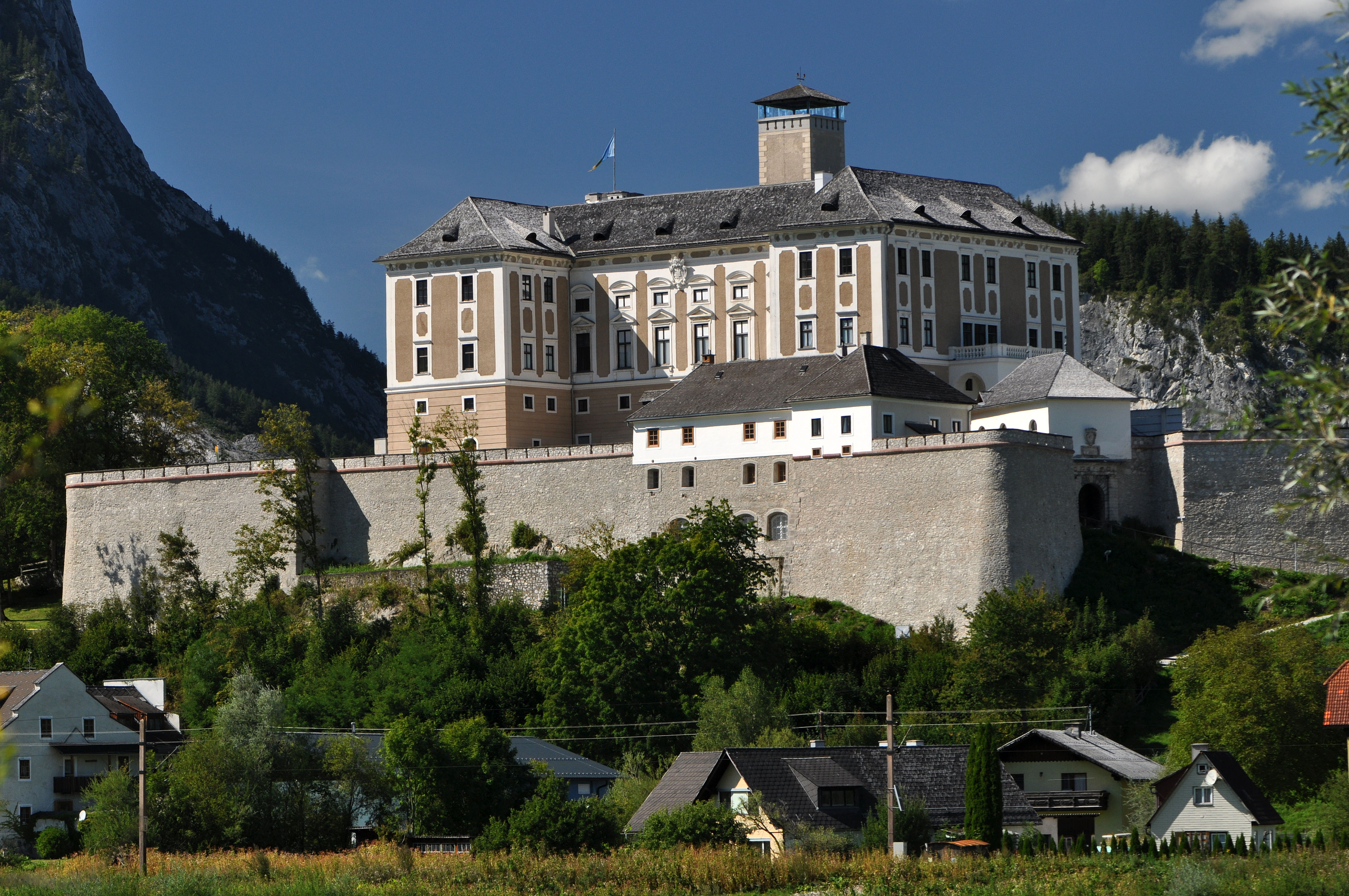 Schloss Trautenfels (Neuhaus) samt Kapelle, Gemeinde Pürgg-Trautenfels, Steiermark